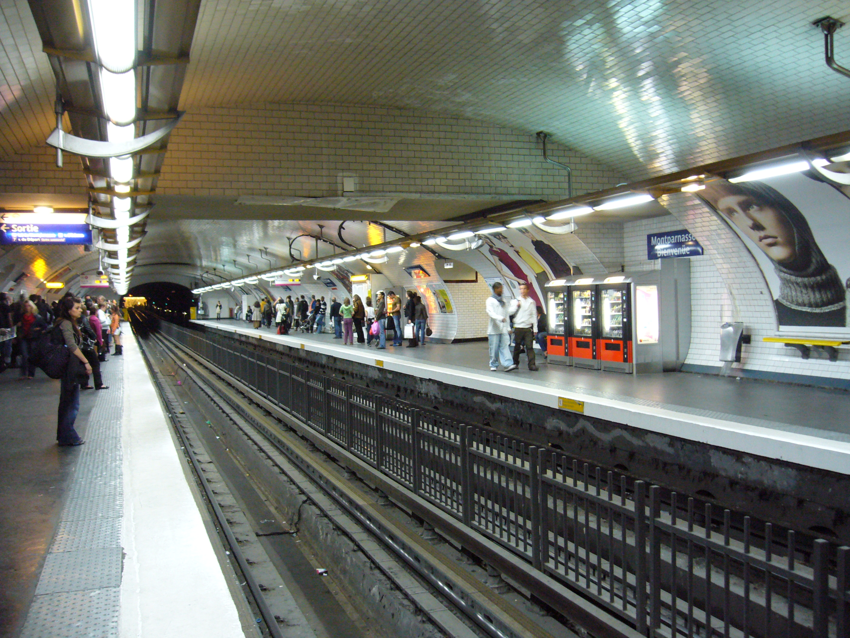 Quais de la station Montparnasse sur la ligne 4 du métro de Paris.